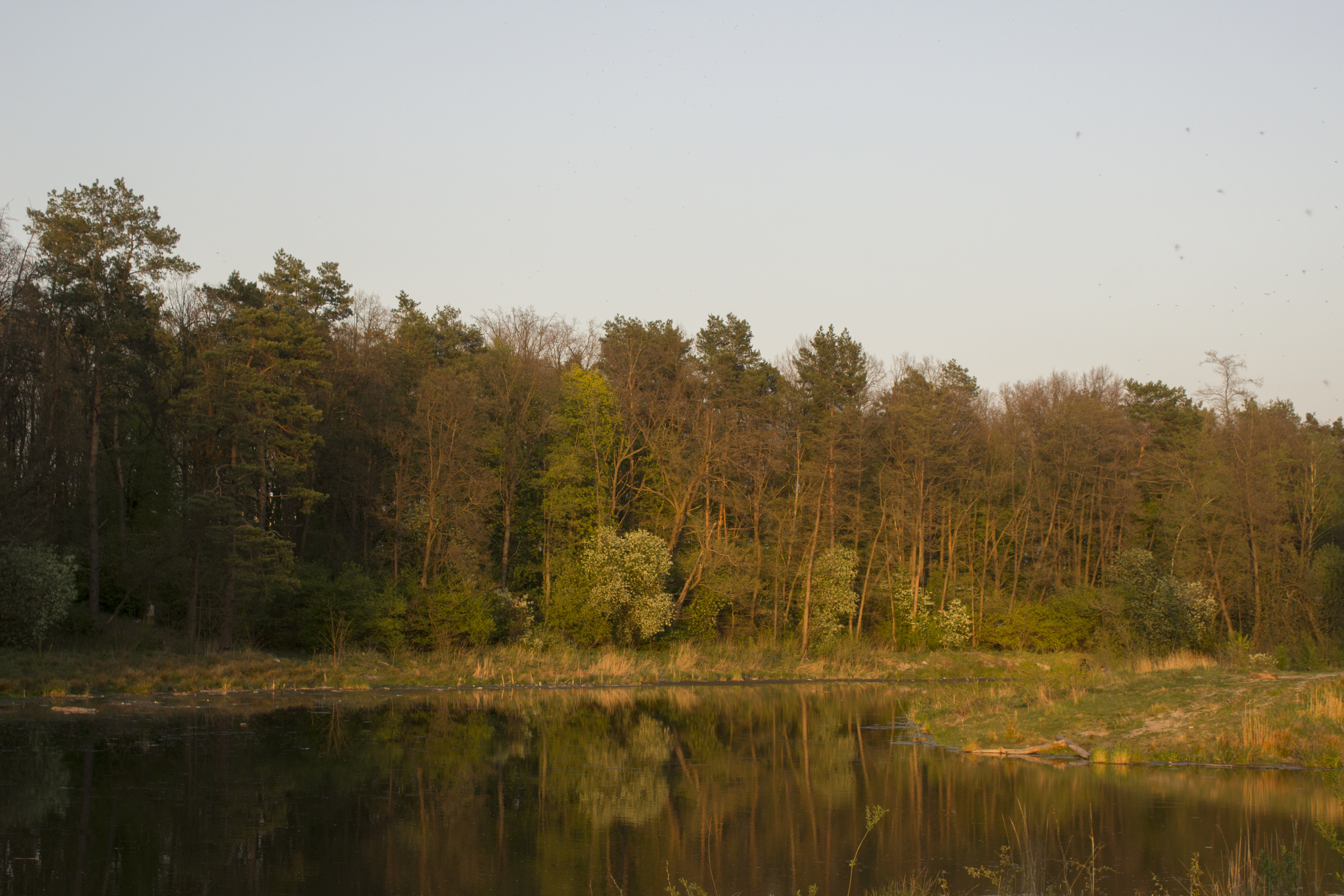 Річка Любка, Святошинський район